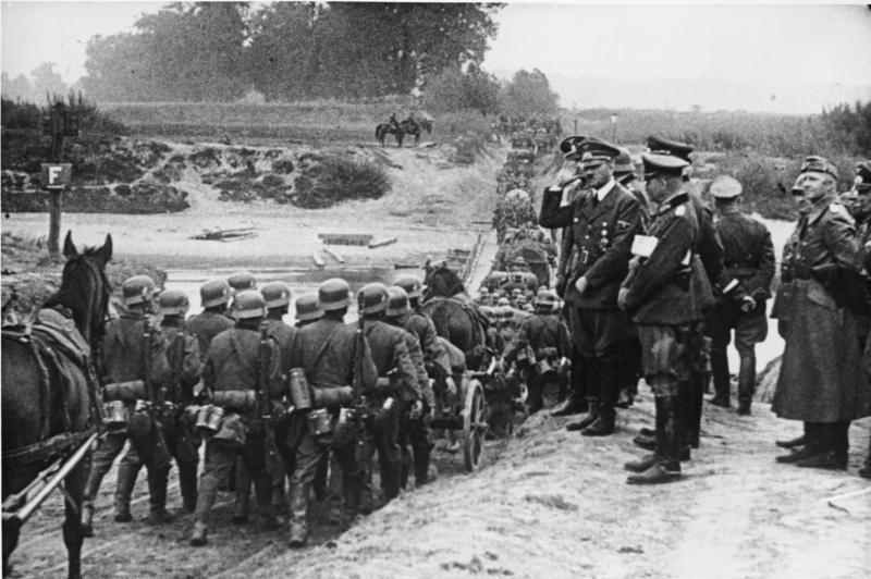 Polen, Parade vor Adolf Hitler Scherl Bilderdienst: Aus dem Film "Feldzug in Polen". UBz: eine der packendsten Szenen; deutsche Soldaten, die während ihres Vormarsches am Führer vorüberziehen. 4.2.1940 [Herausgabedatum] [Polenfeldzug.- Vorbeimarsch von deutschen Truppen an Adolf Hitler (auf einer Böschung erhöht stehend und grüßend), Sept. 1939] Abgebildete Personen: Hitler, Adolf: Reichskanzler, Deutschland